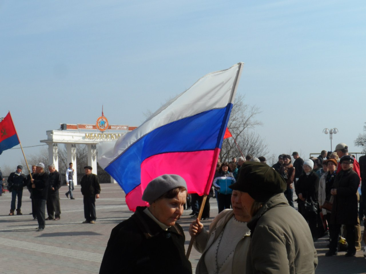 Митинг в Мелитополе